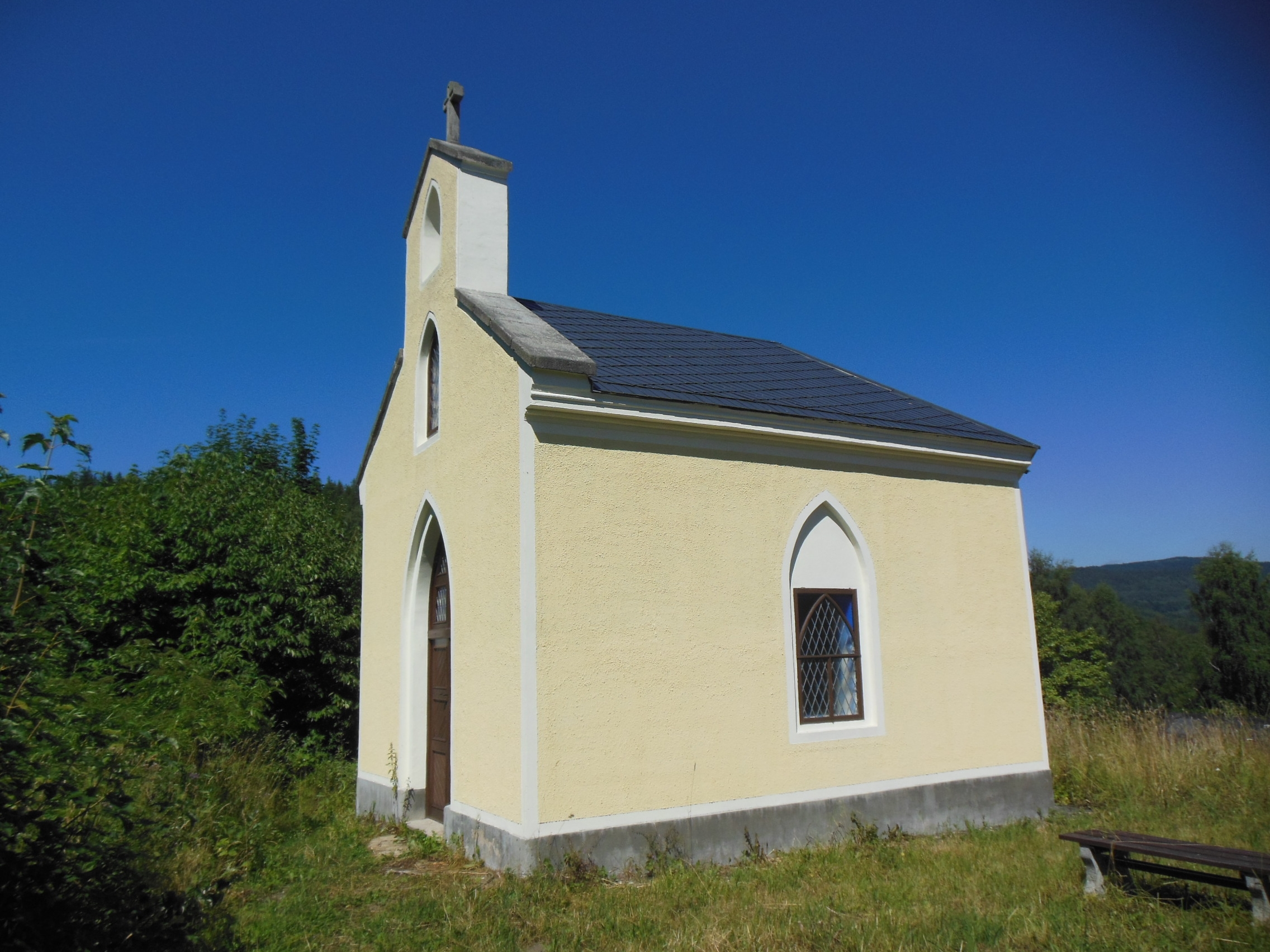 Kaple v Nejdku-Suché (okres Karlovy Vary). Stojí u domu č. p. 16